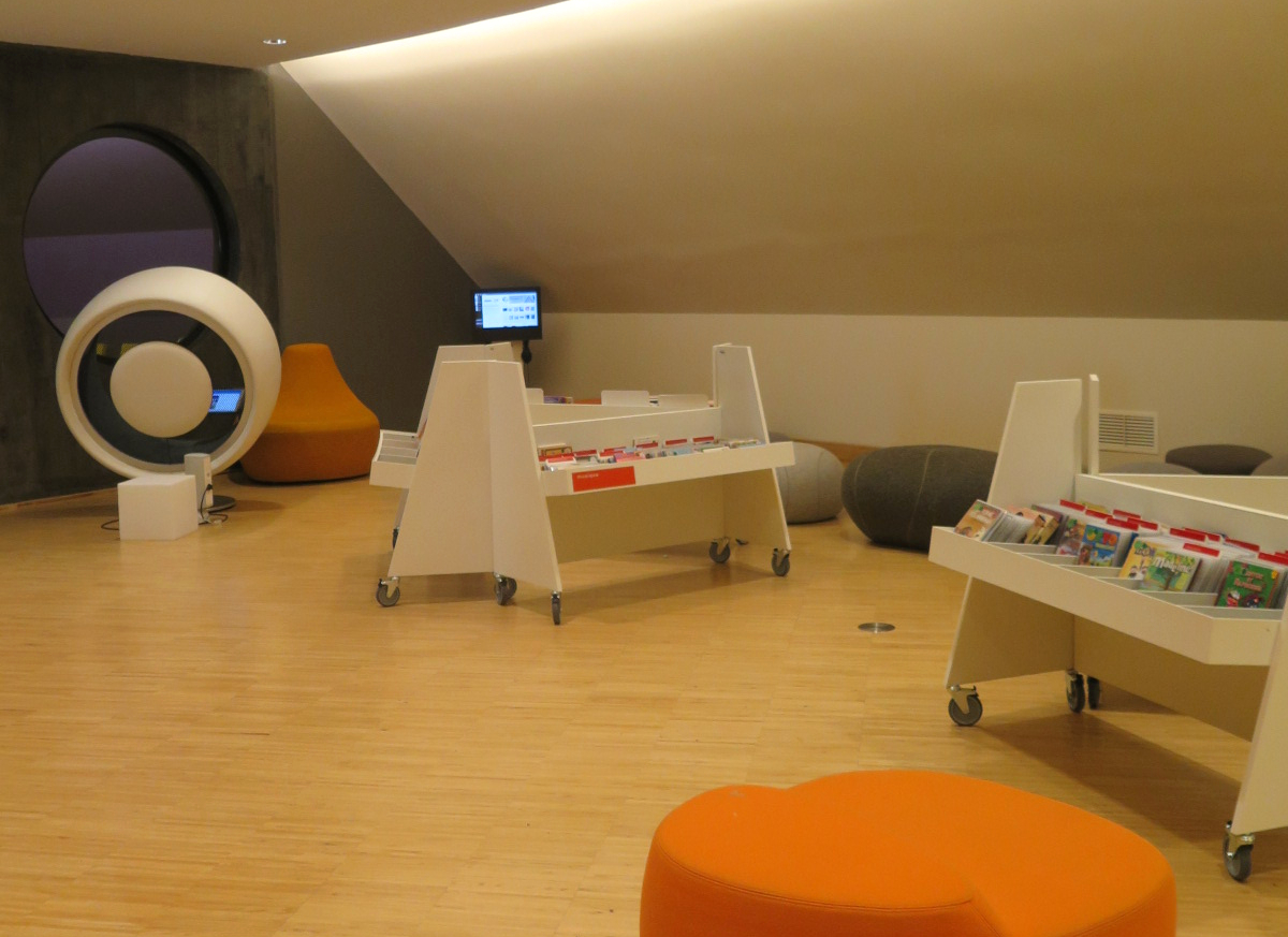 Section Enfance, musique et cinéma, de la Bibliothèque Oscar Niemeyer du Havre. A gauche, une borne d'écoute Sonic Chair. Au fond, une borne d'écoute Doob.